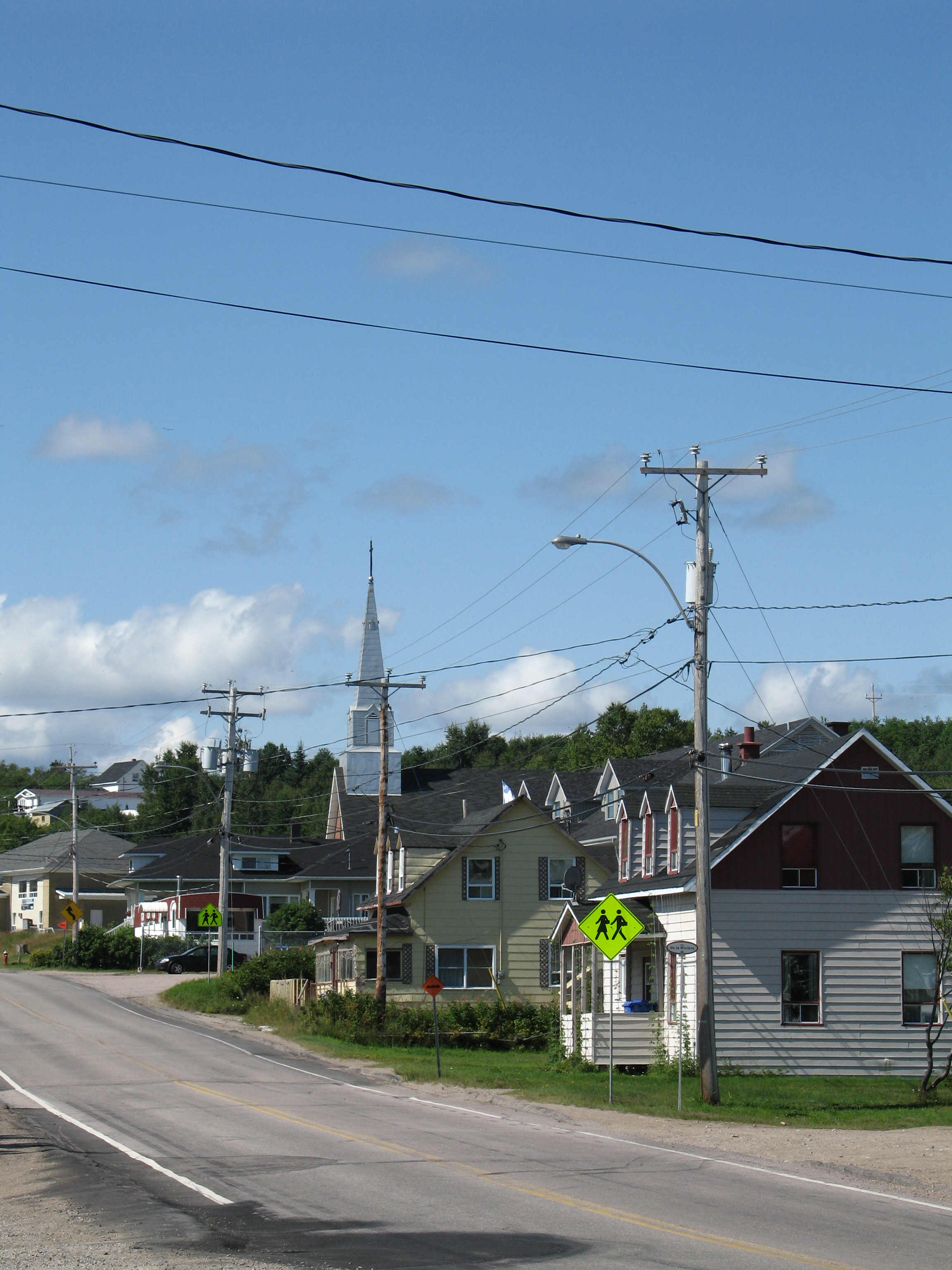 Le village de Longue-Rive, Québec (partie Sault-au-Mouton)